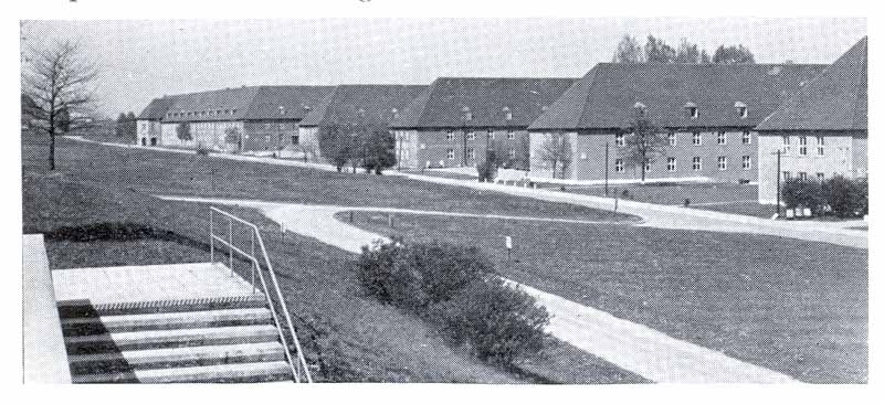 Nibelungen-Kaserne